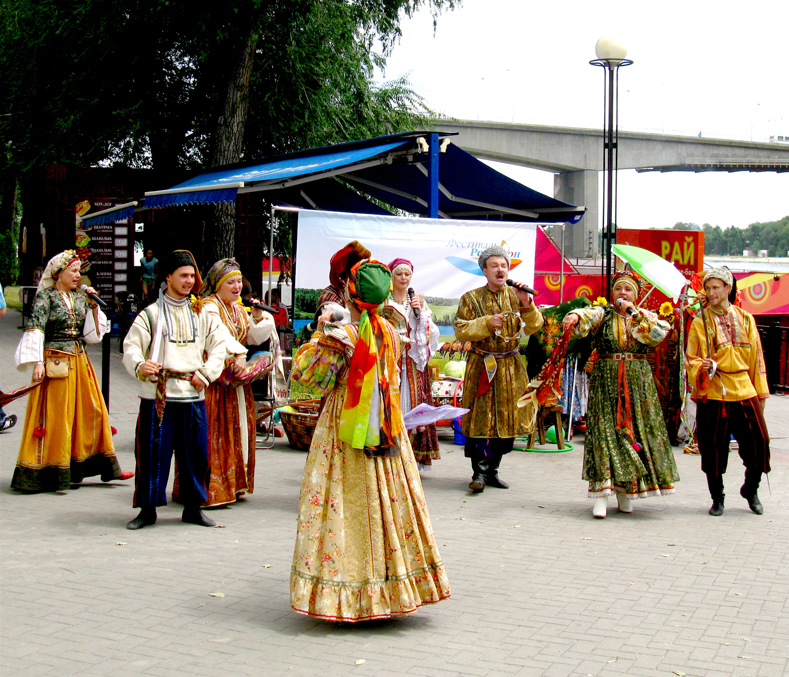 Ростовские казаки пляски на набережной Ростова-на-Дону